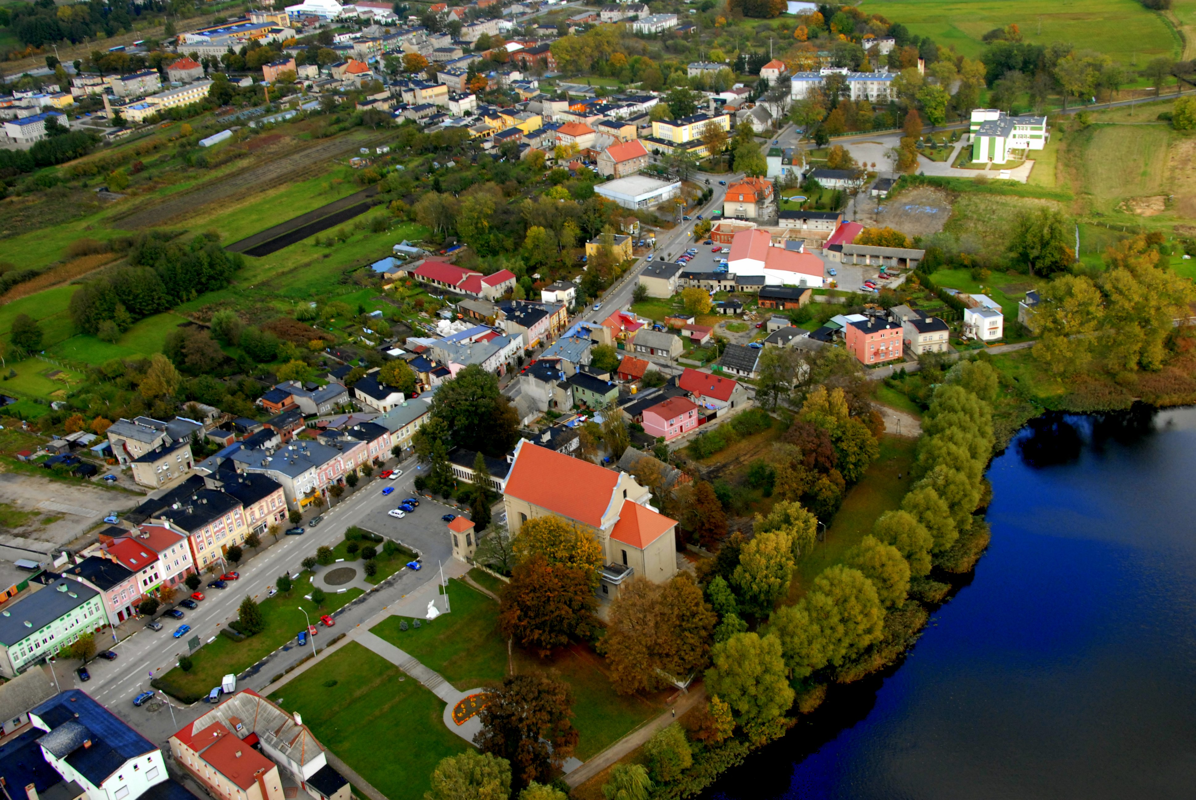 Centrum Więcborka z lotu ptaka